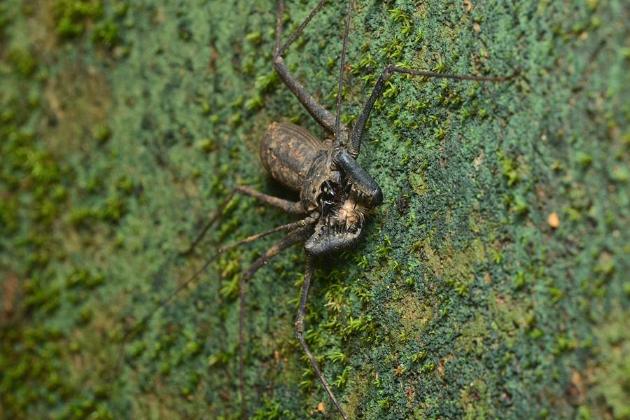 Amblypygi Isla Colón, Bocas del Toro, Panama